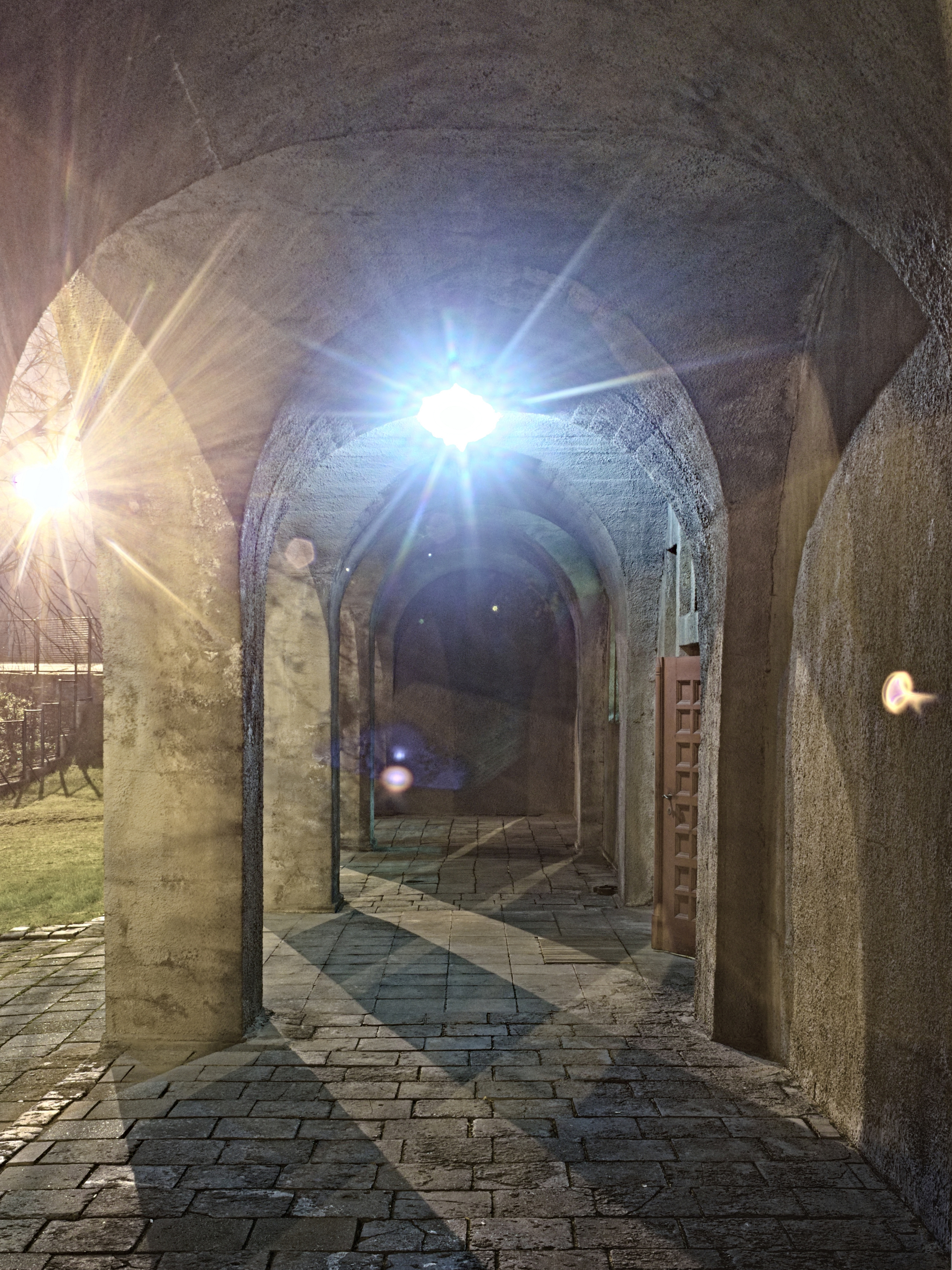 podcienie / arkady przy wejściu do dolnego kościoła św. Barbary w Bytomiu, kondygnacja poniżej głównego poziomu świątyni